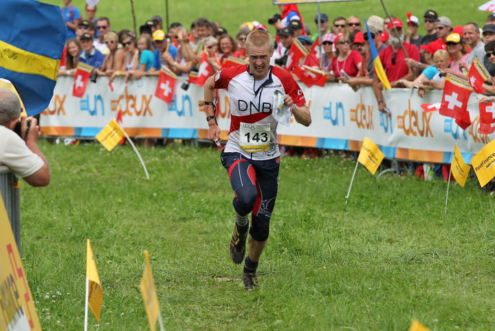 WOC 2012, Long finish